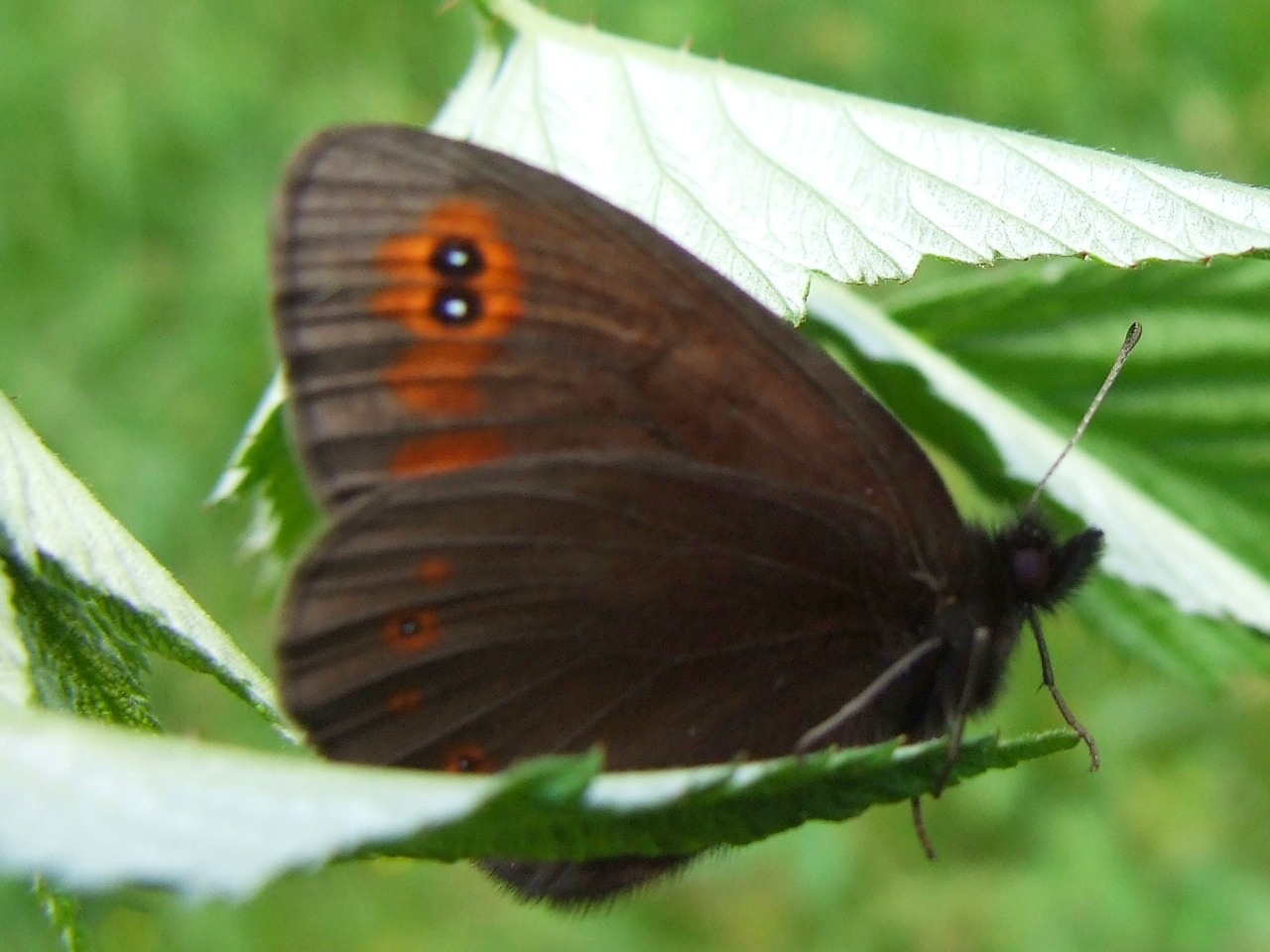 Erebia medusa (brak 1 czułka)